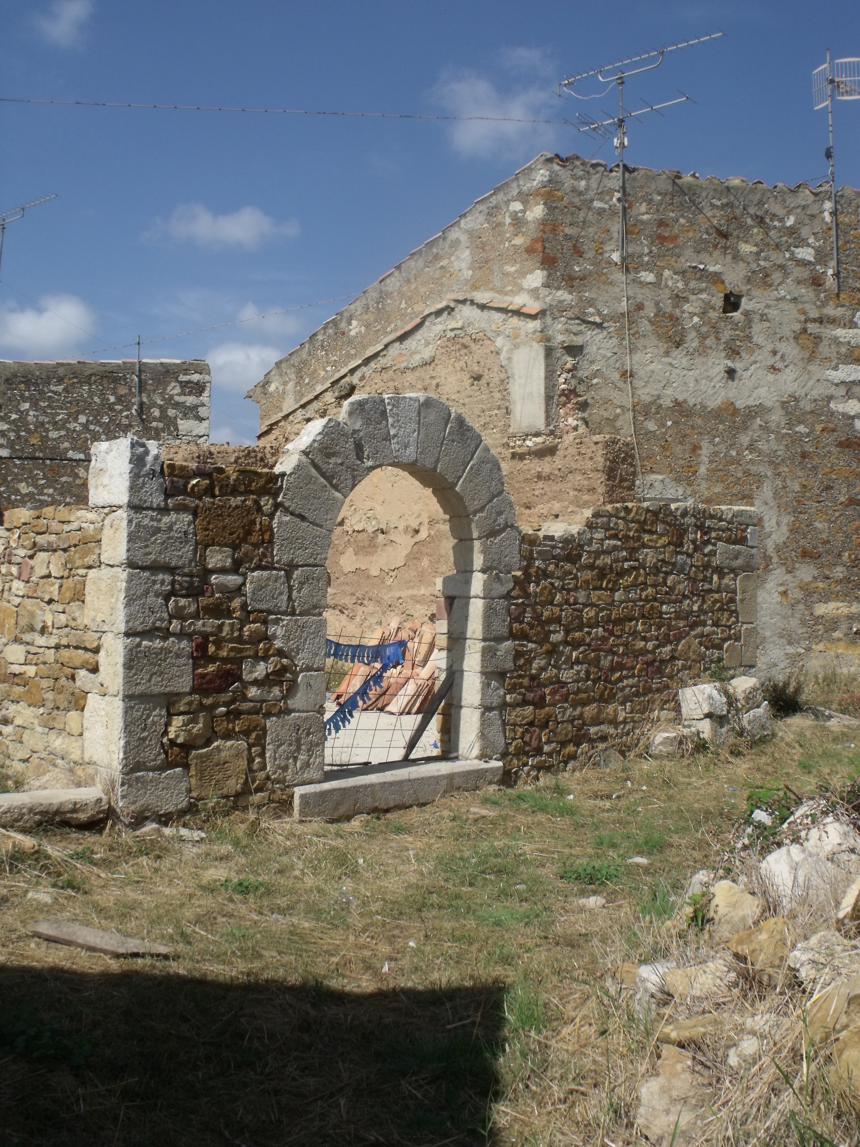 Antiguo castillo